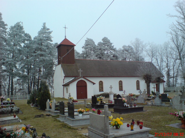 Kościół i cmentarz w Paterniku, pow. bolesławiecki